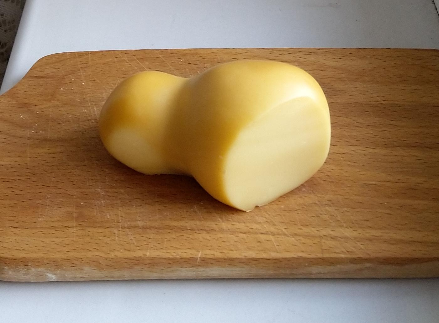 Scamorza affumicata sicilia